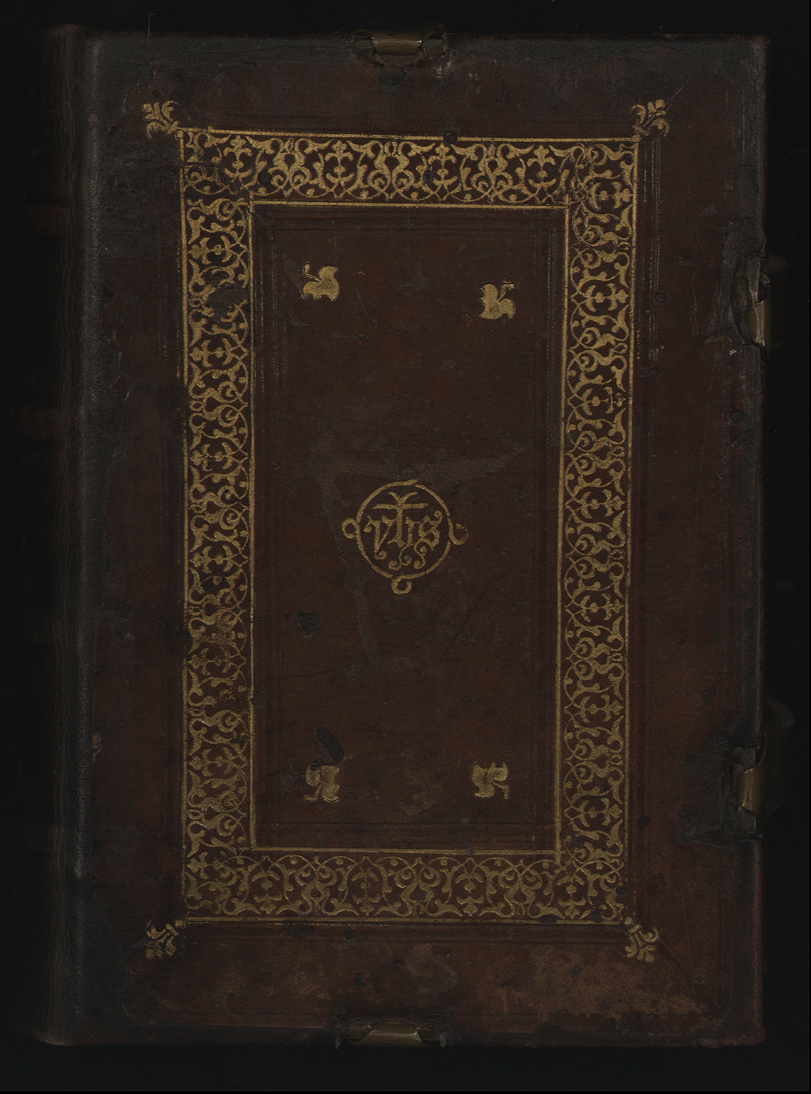 Psalterium romanum. [Venezia]: sec. XV. Membr., cc. 331 n. n. con miniature; 12x17 cm.